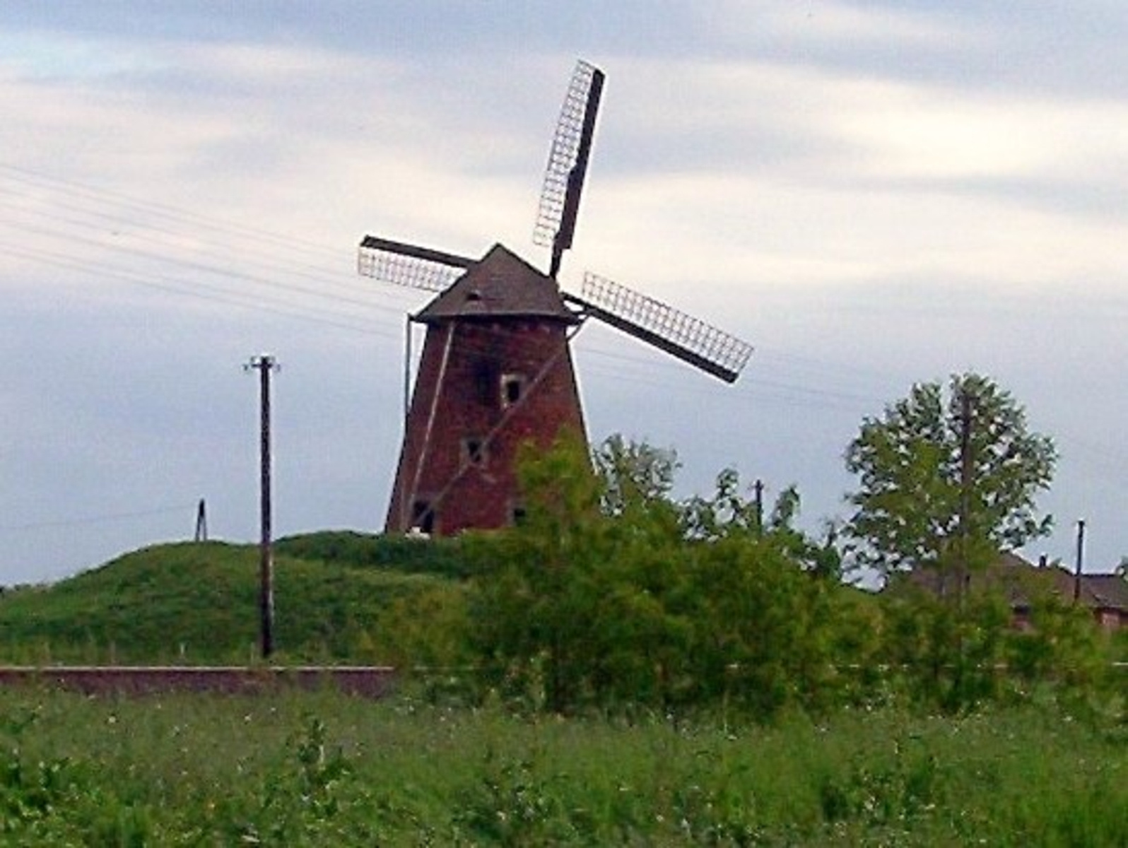 Szélmalom (Kengyel, Bagimajor) This is a photo of a monument in Hungary, Identifier: 6010